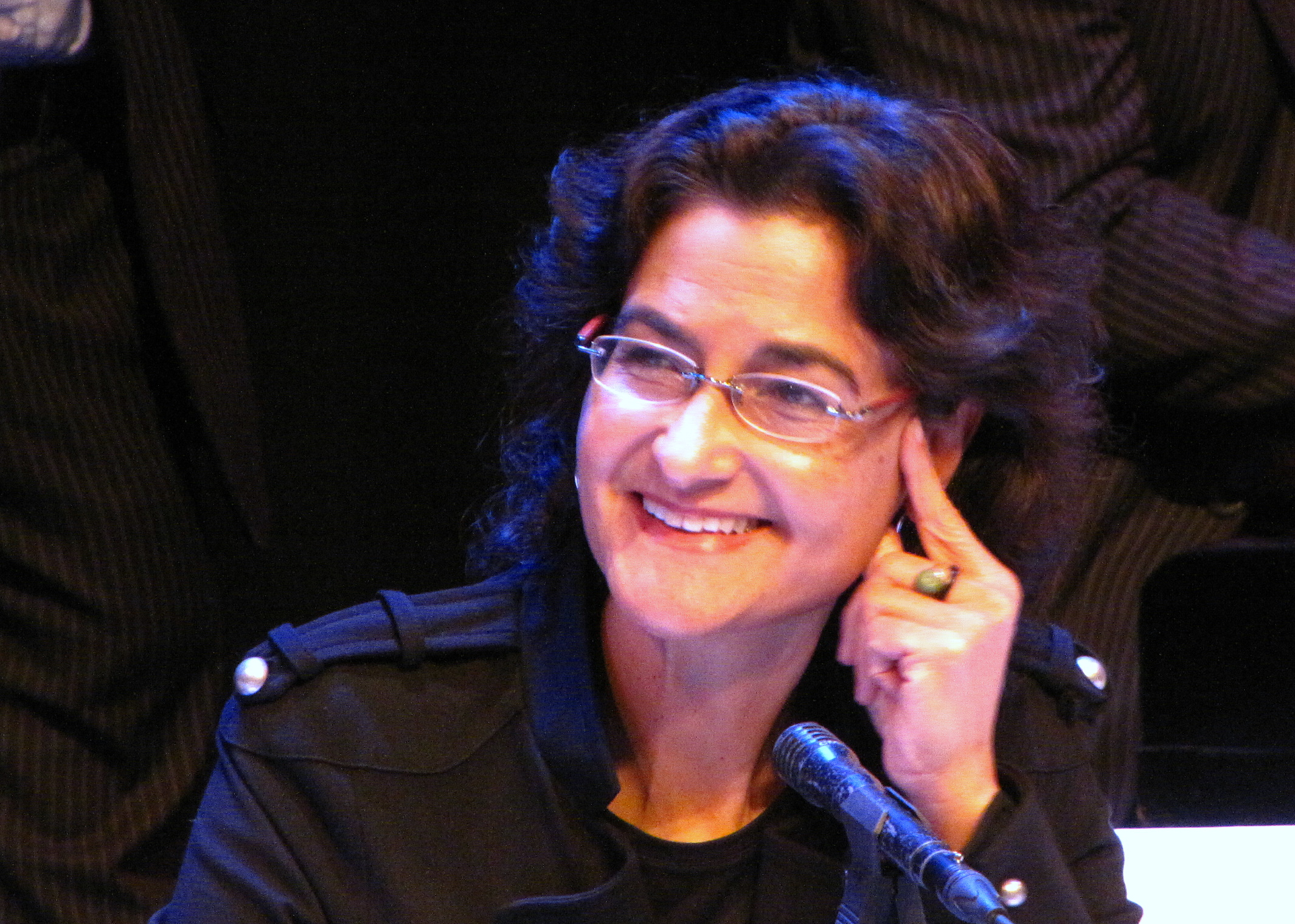 Derde "Pimemt", politiek café. Amphion, Doetinchem. Hella Hueck van RTL-Z.